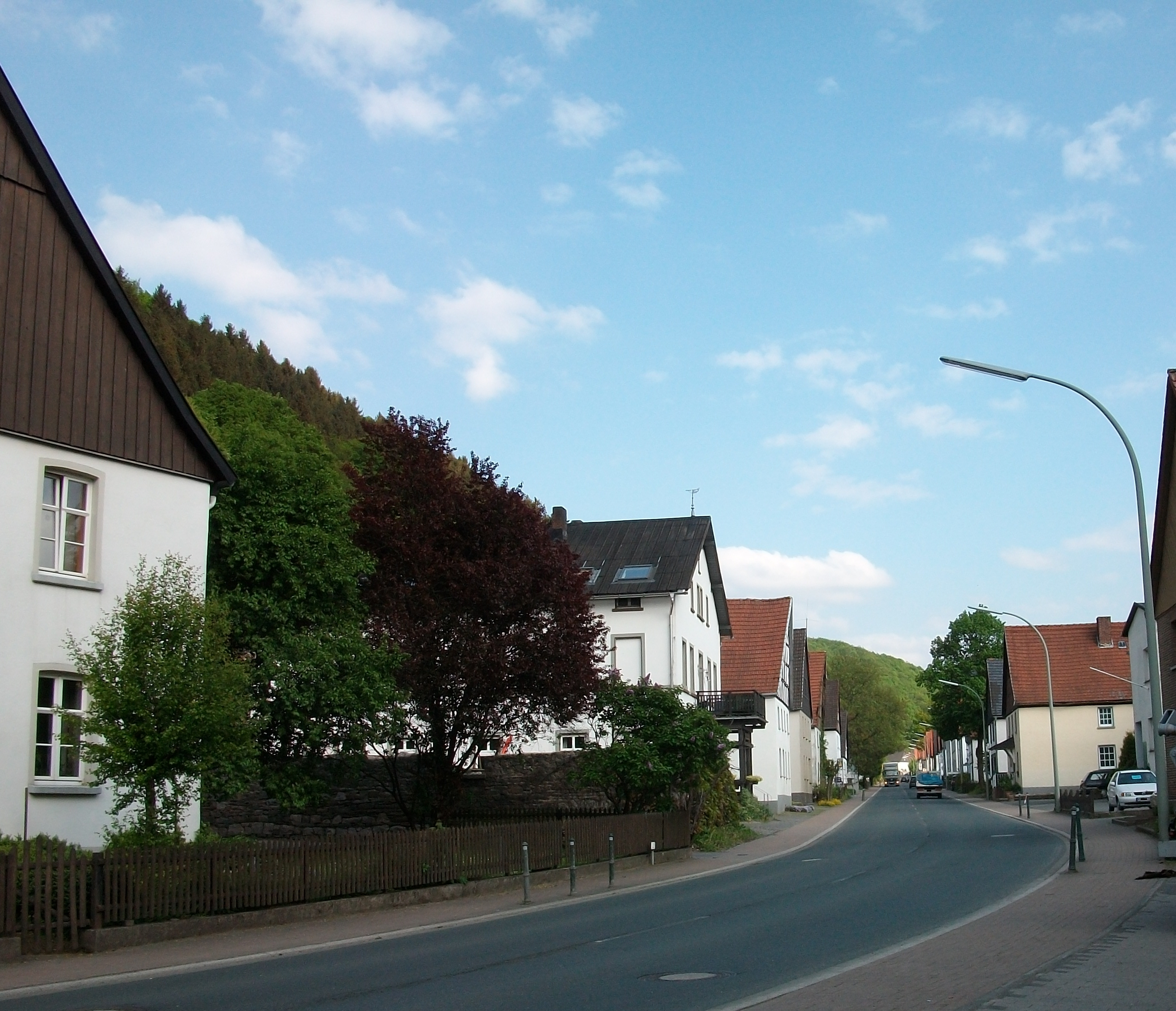 Sundern-Hagen (Germany)